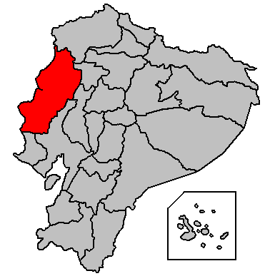 Ubicación de esta provincia en el Ecuador